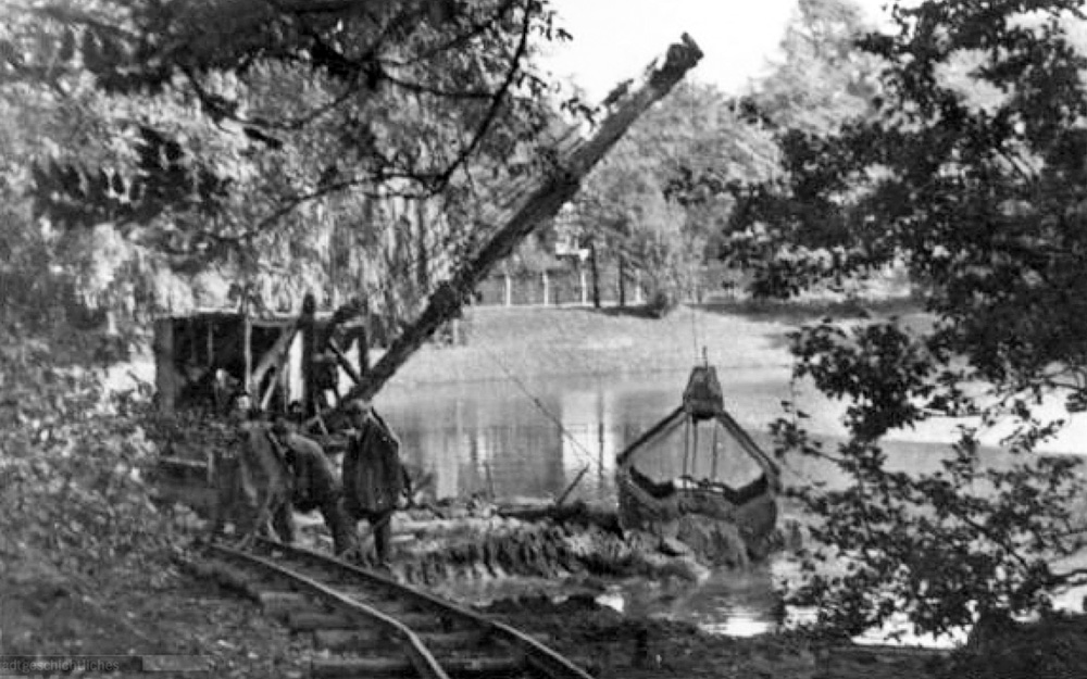 Vertiefung des Parkteichs in Leipzig-Eutritzsch 1937